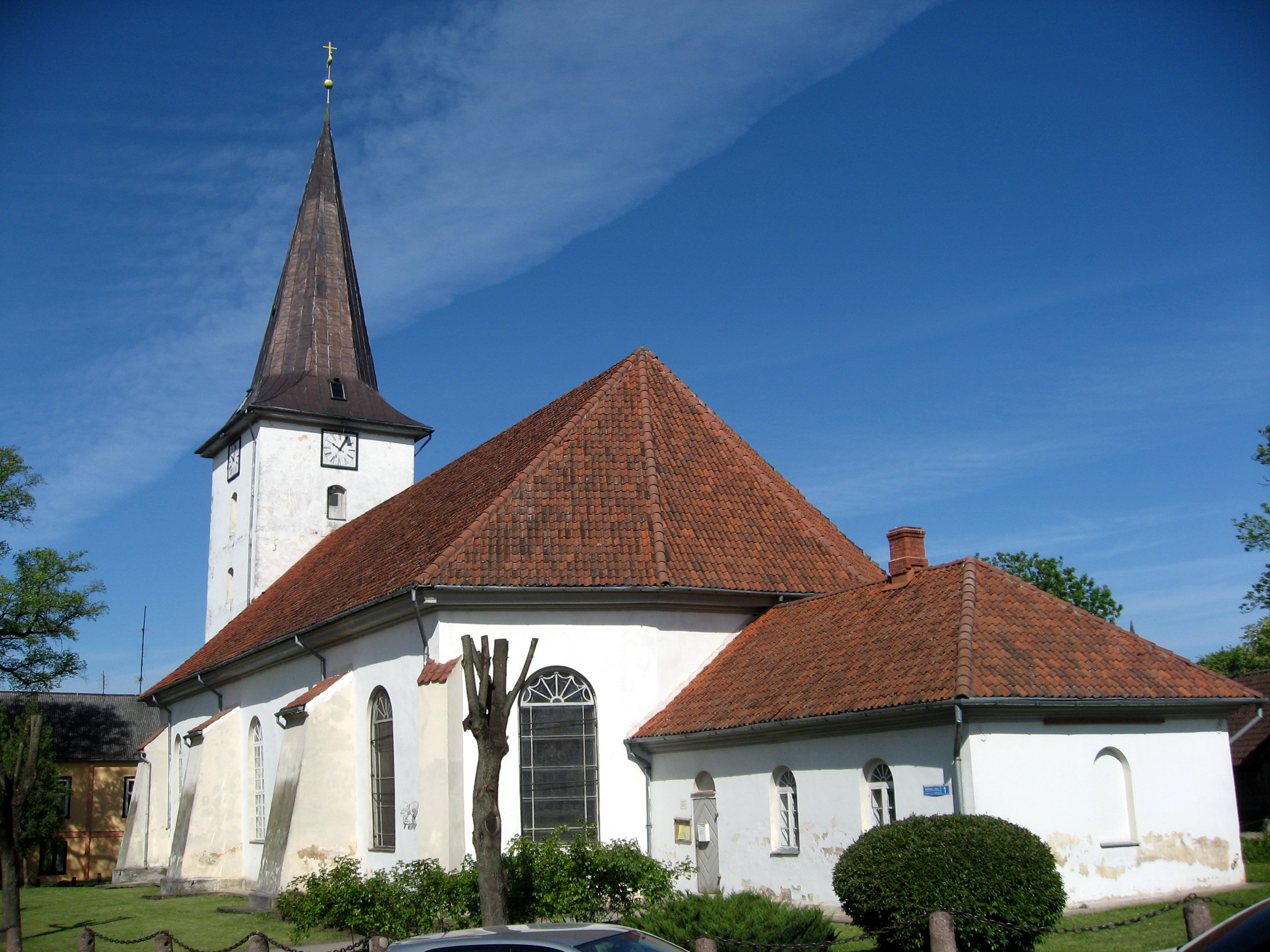 Tukums, luteránský kostel